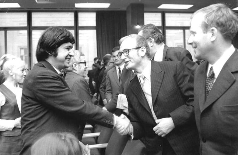 Zentralbild Franke 24-3-71 Berlin: Heinrich-Mann-Ausstellung in der Stadtbibliothek Der Schriftsteller Hermann Kant (2.v.r.) beglückwünscht den diesjährigen Heinrich-Mann-Preisträger Jurek Becker (l.), der mit Erik Neutsch und Herbert Otto den Preis der Deutschen Akademie der Künste der DDR erhielt. In Anwesenheit namhafter Persönlichkeiten des öffentlichen Lebens wurde am 24.3.71 in der Berliner Stadtbibliothek eine repräsentative Heinrich-Mann-Ausstellung eröffnet.